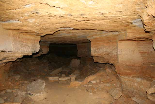 Odessa catacombs